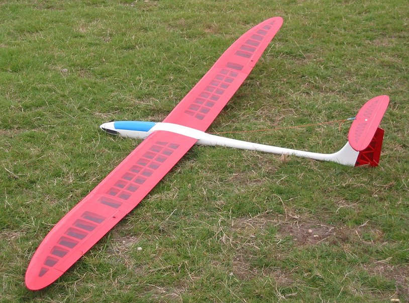 zelfgemaakte foto van modelzweefvliegtuig